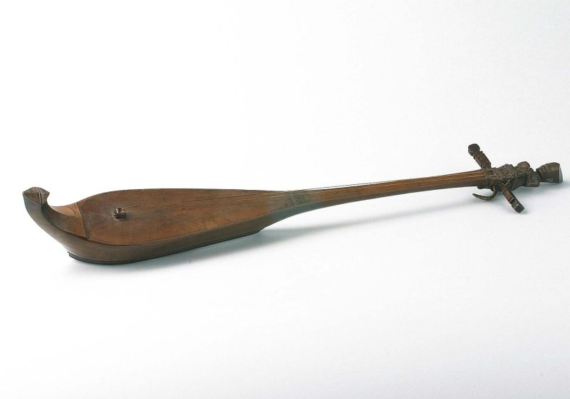 Tokkelinstrument. Langhalsluit met twee snaren Unknown language: Hasapi